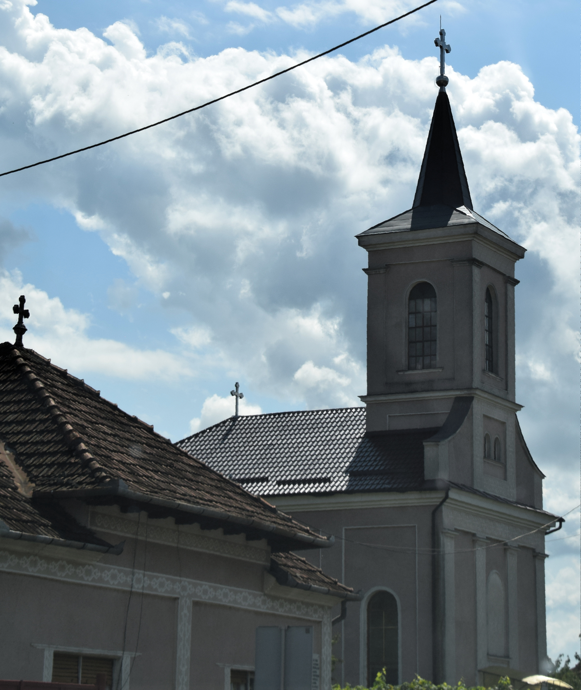 Biserica din Aușeu, Bihor